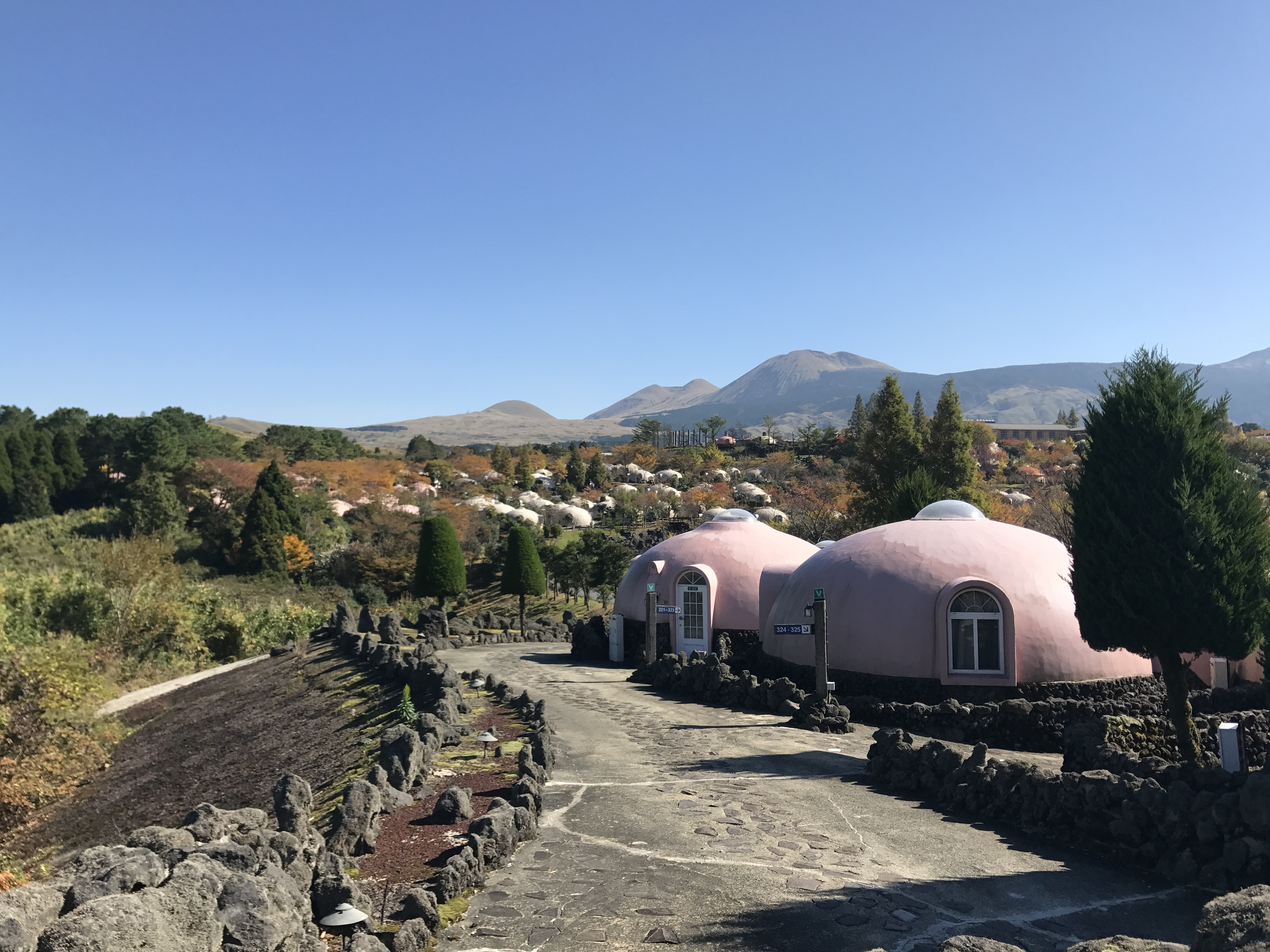 阿蘇ファームランド・ロイヤルゾーンより望む阿蘇山